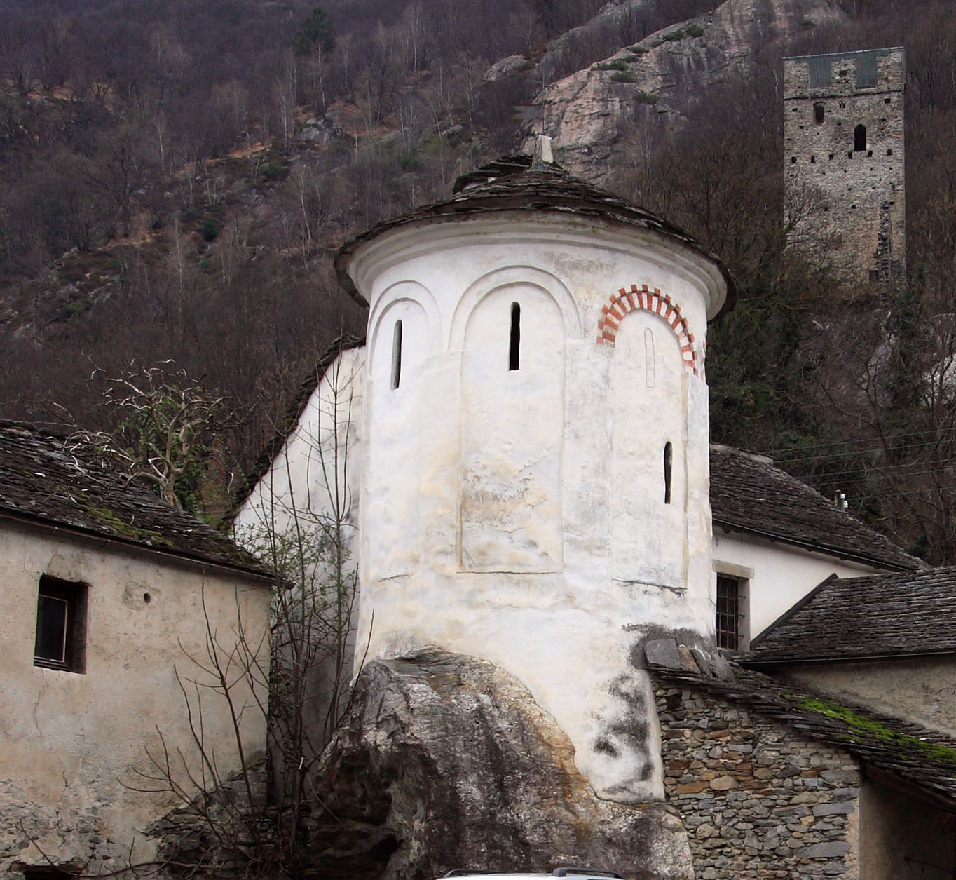 Cappella di S. Lucio